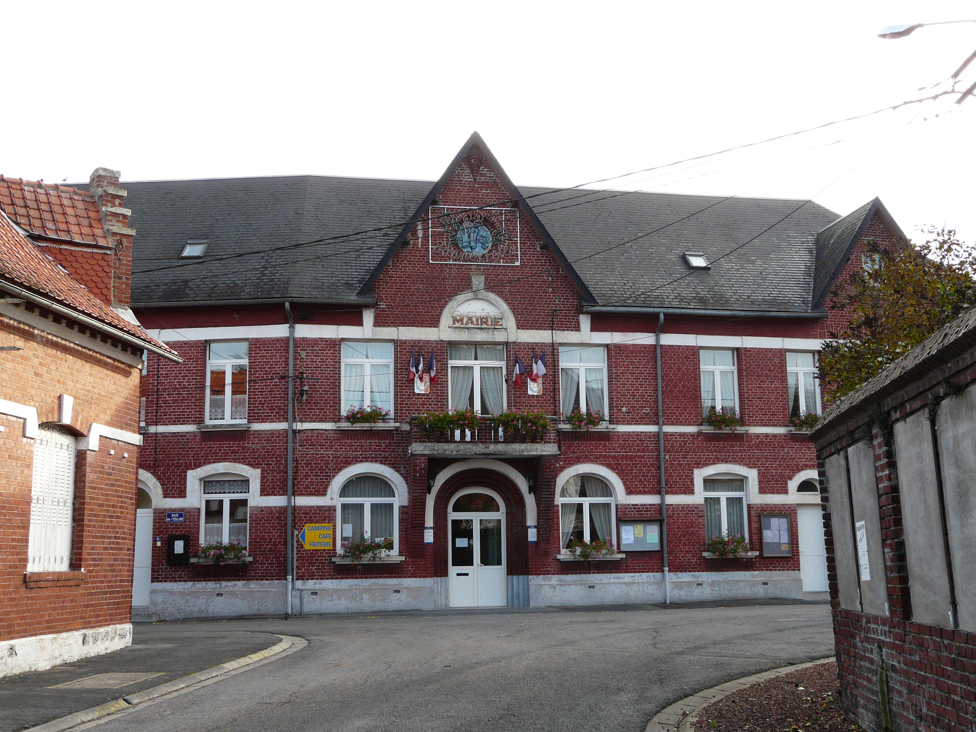 La mairie de Honnecourt-sur-Escaut (Nord, France)